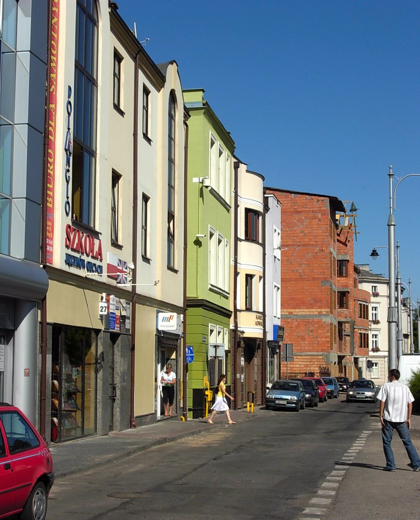 Ulica Pod Blankami w Bydgoszczy